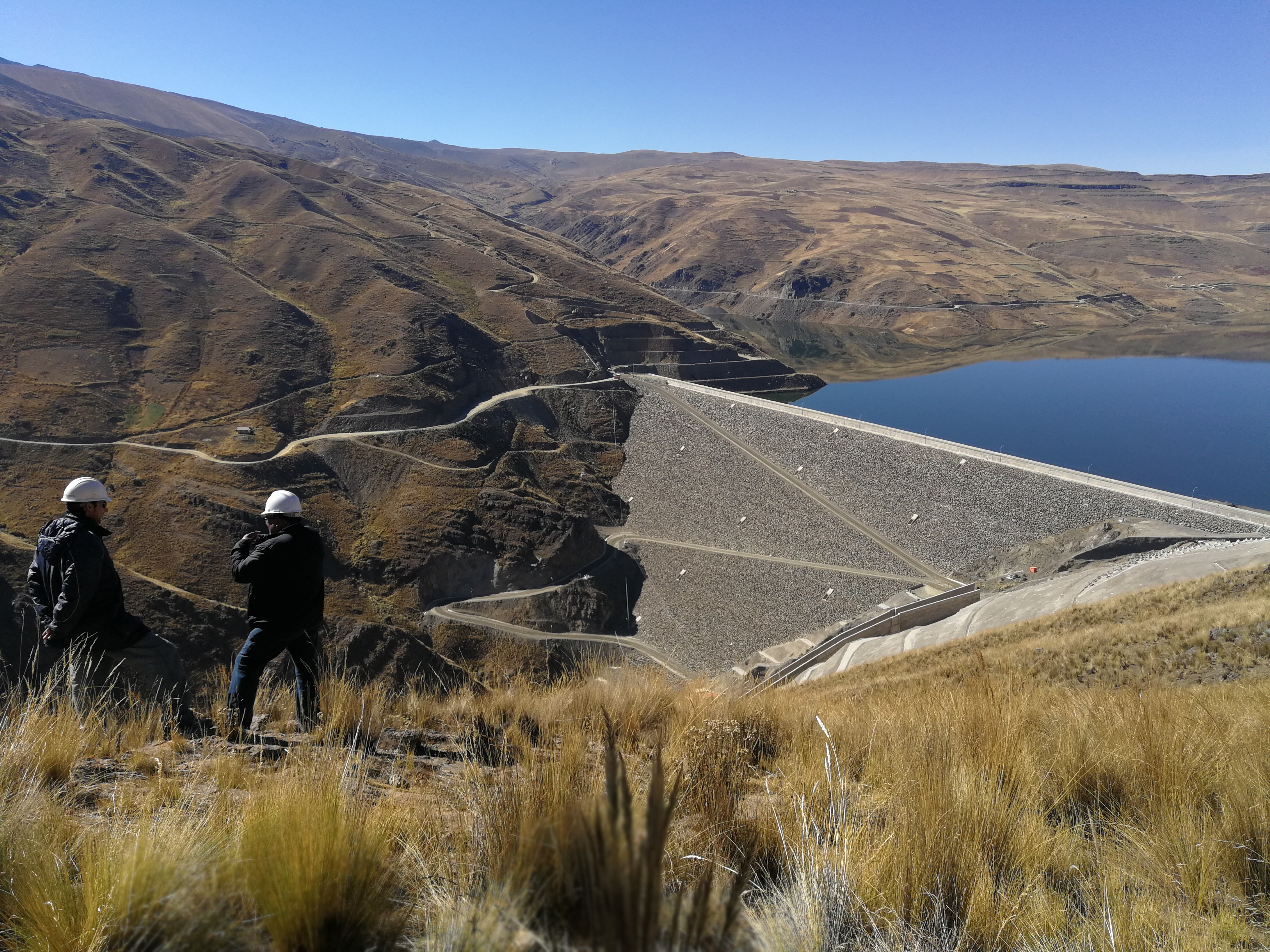 inspeccion autoridades MMAyA presa Misicuni